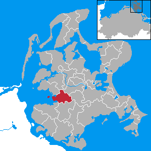 Dreschvitz, Landkreis Rügen, Mecklenburg-Vorpommern